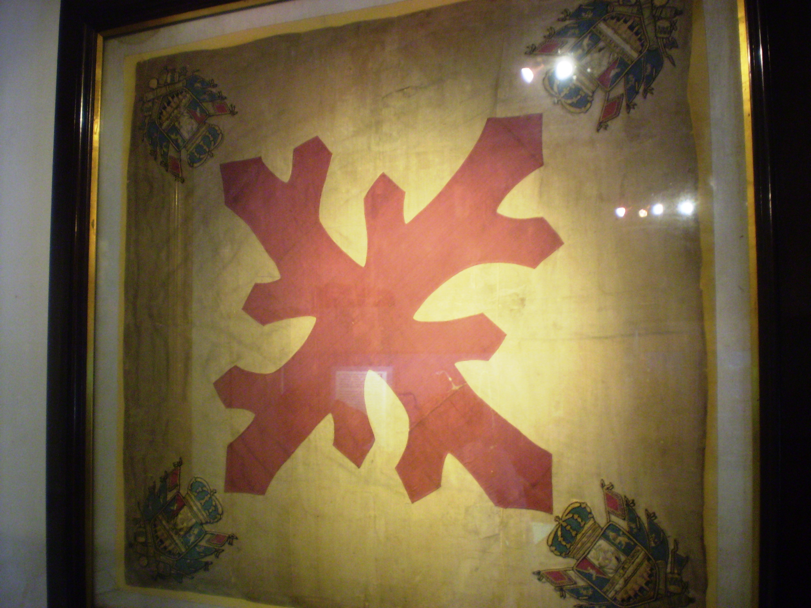 Pabellón del Imperio Español, capturado por las fuerzas patriotas durante la batalla del Cerro de Pasco. Remitida por el gral San Martín de Lima a Buenos Aires. Actualmente en el Museo Histórico del Norte, cabildo de la ciudad de Salta, Argentina